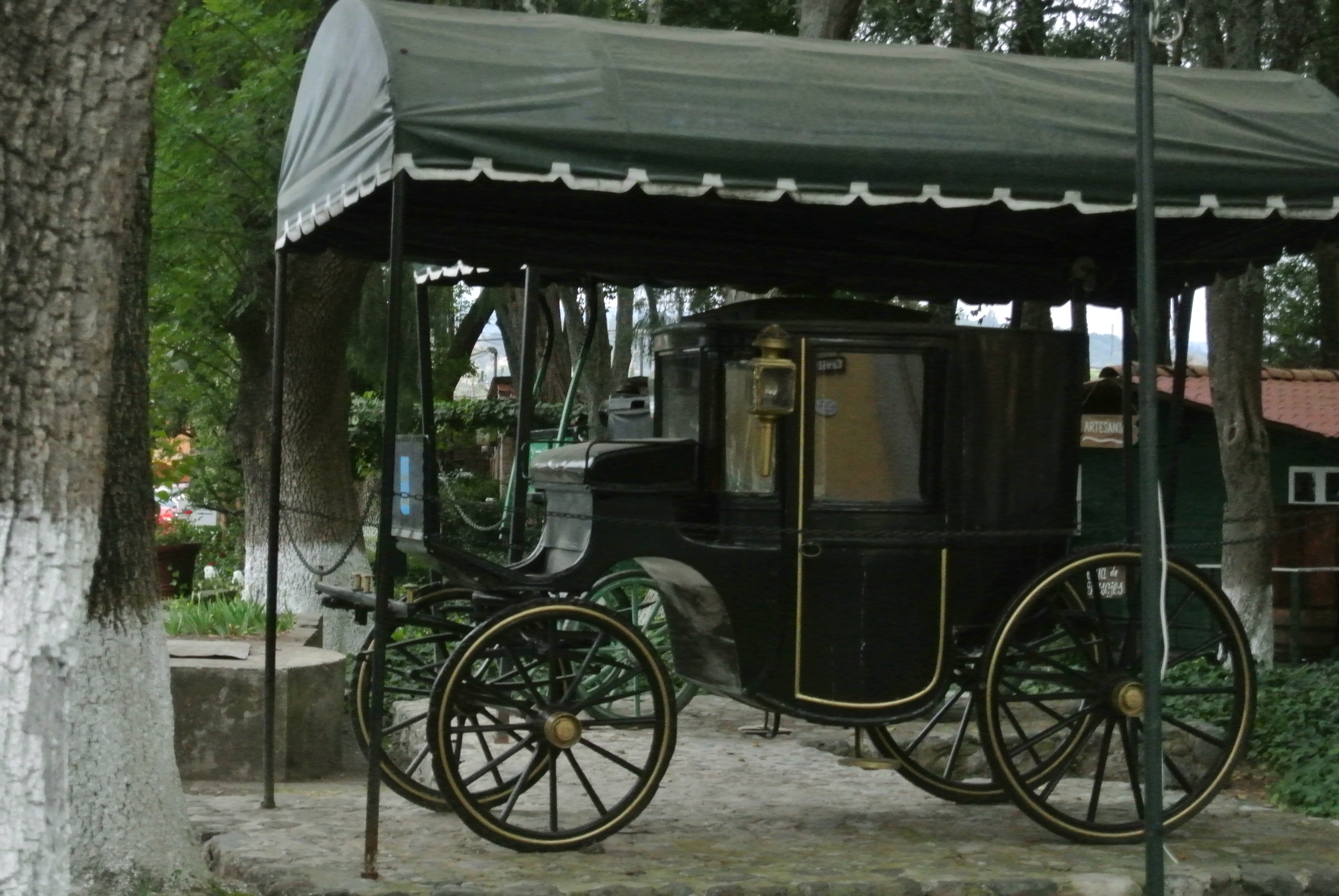 Carruaje de finales del siglo 18 o principios del siglo 19 en San Miguel Regla, México. Con llantas de caucho o goma no neumáticas (caucho sólido)